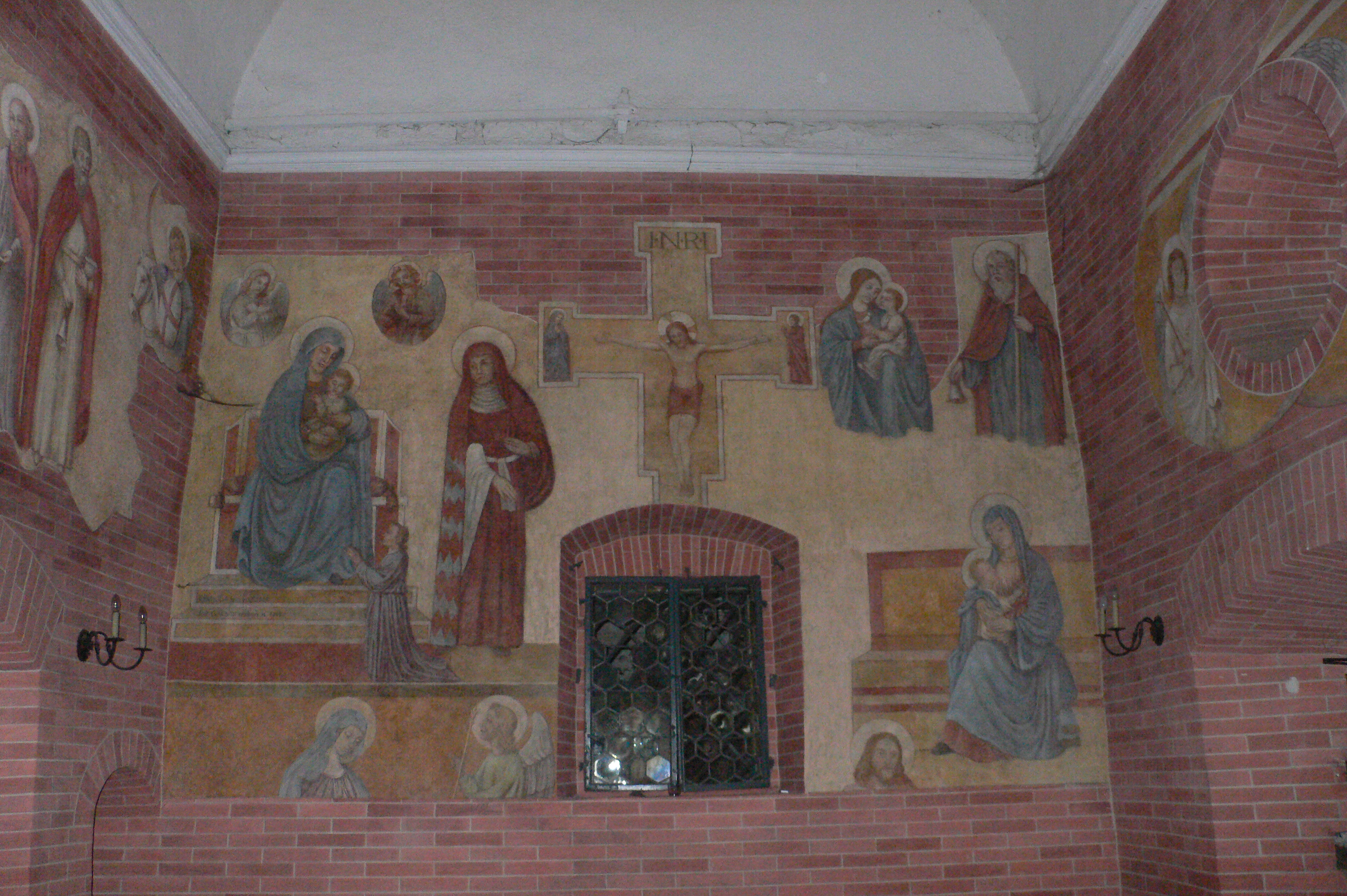 Rückwand mit Heiligen und byzantinischem Kreuz